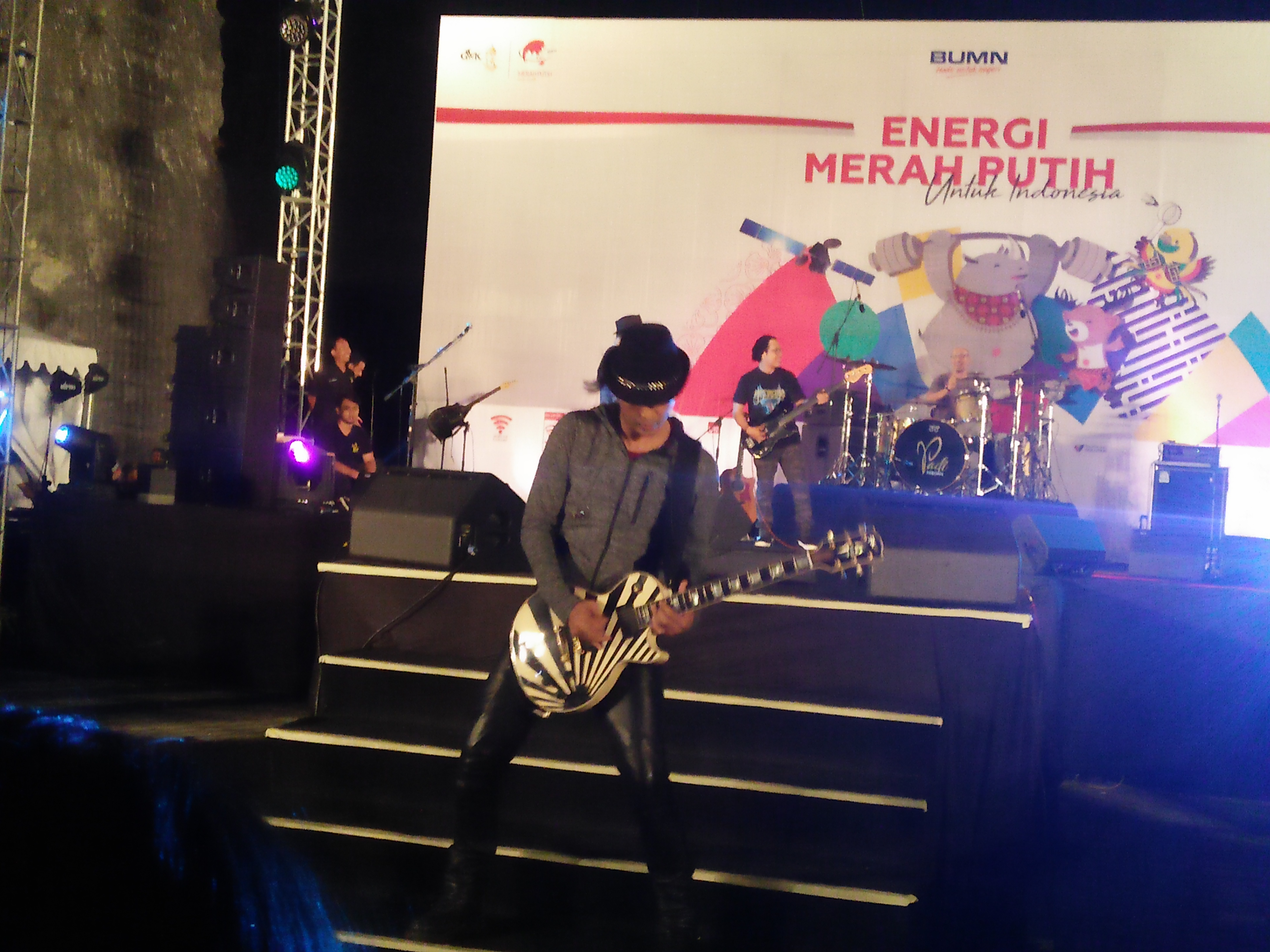 Aksi Group Band Padi dalam memeriahkan parade obor Asian Games di GWK, Jimbaran, Bali tgl 24 Juli 2018